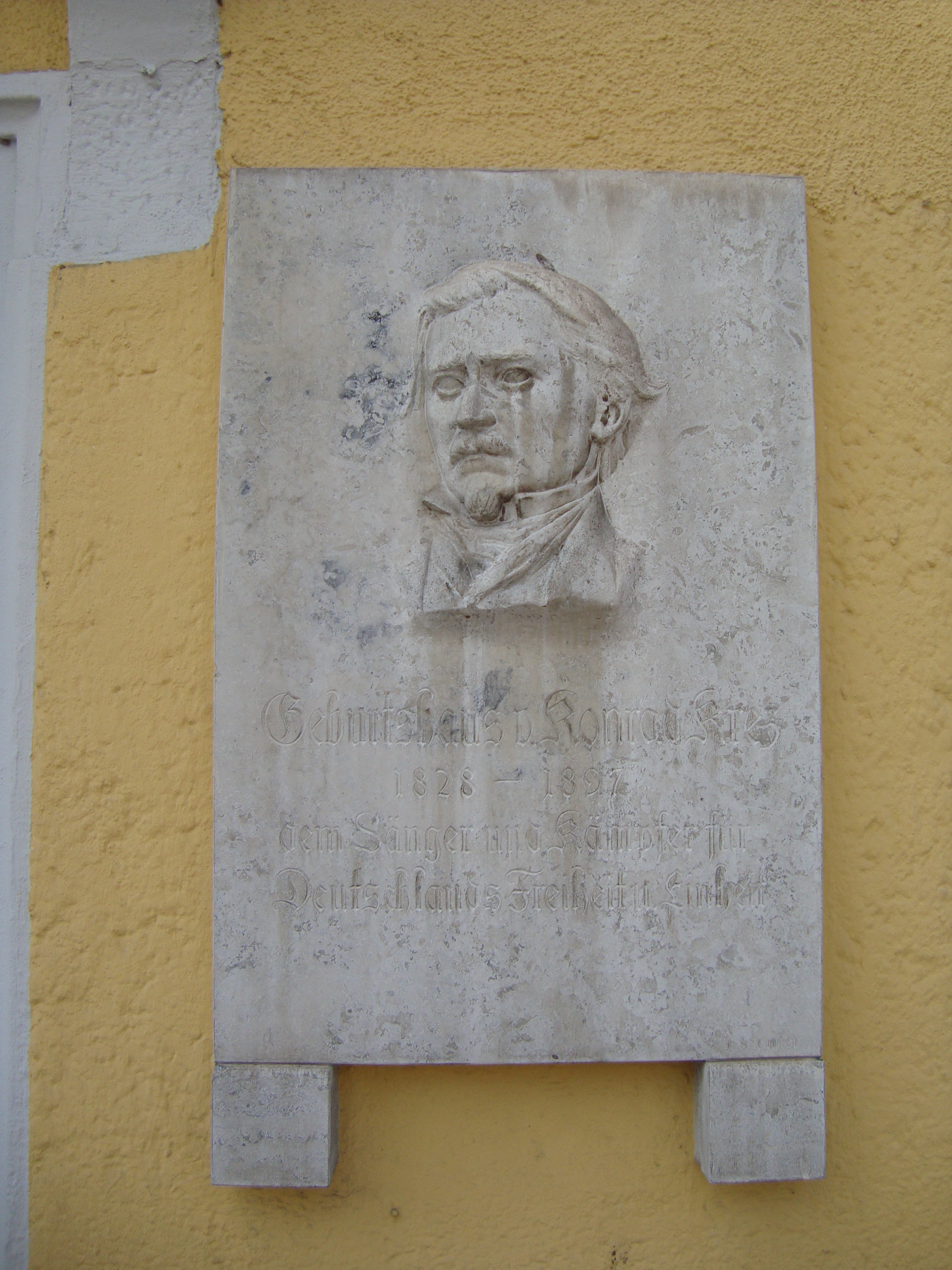 Gedenktafel für Konrad Krez an seinem Geburtshaus in Landau in der Pfalz